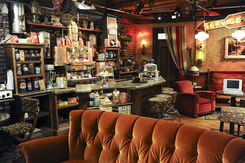 Los Angeles 2012